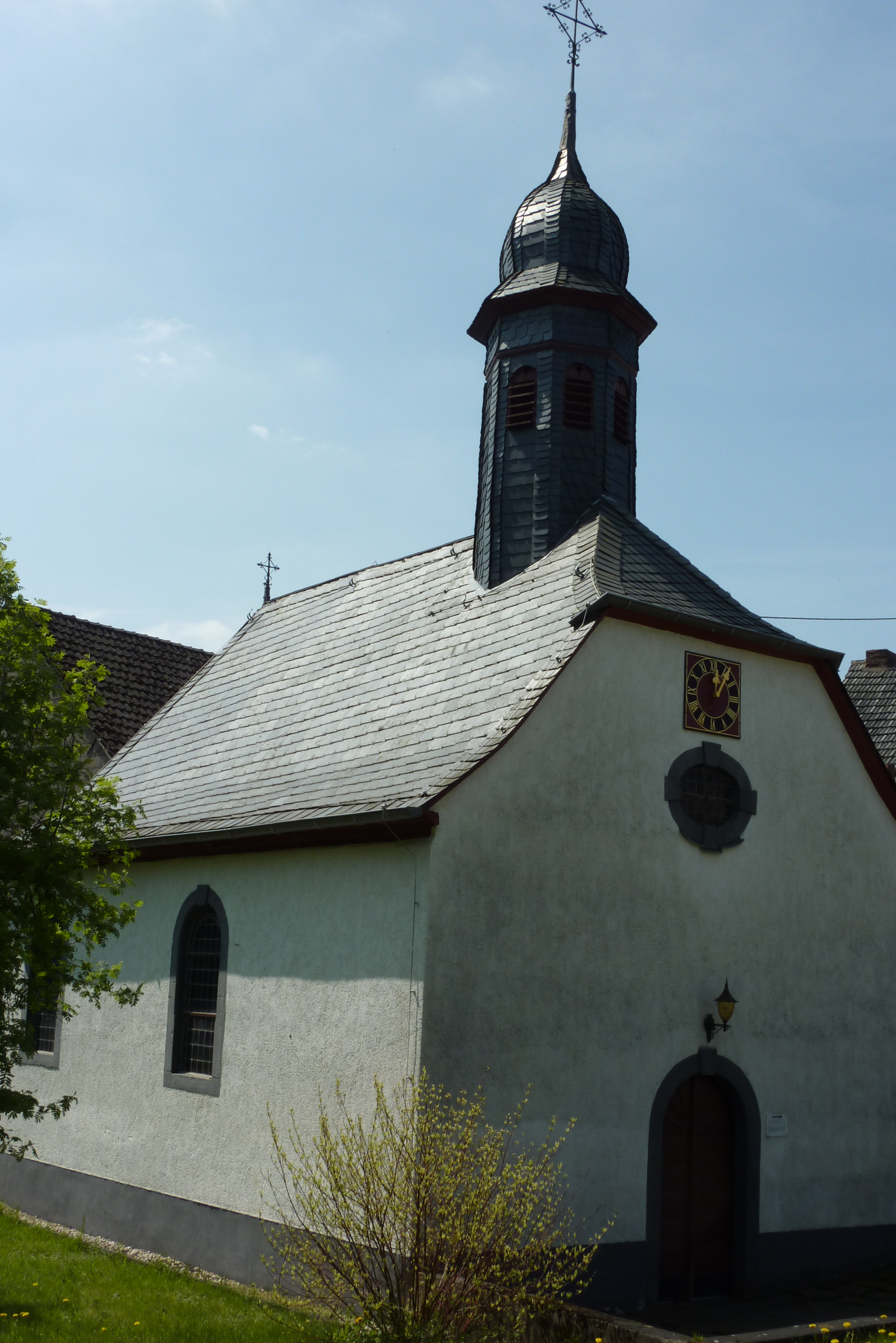 Kapelle St. Donatus in Oberbaar, Ortsteil von Baar (Eifel)